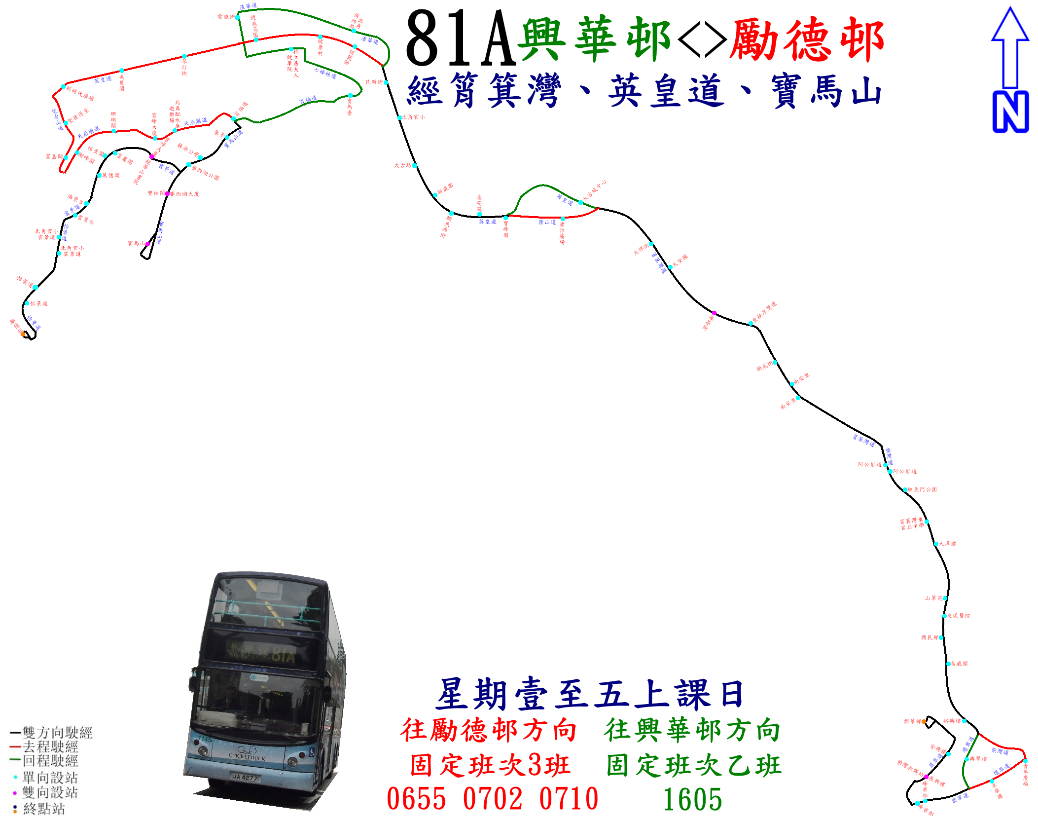 中文（香港）: 新巴81A線的走線圖